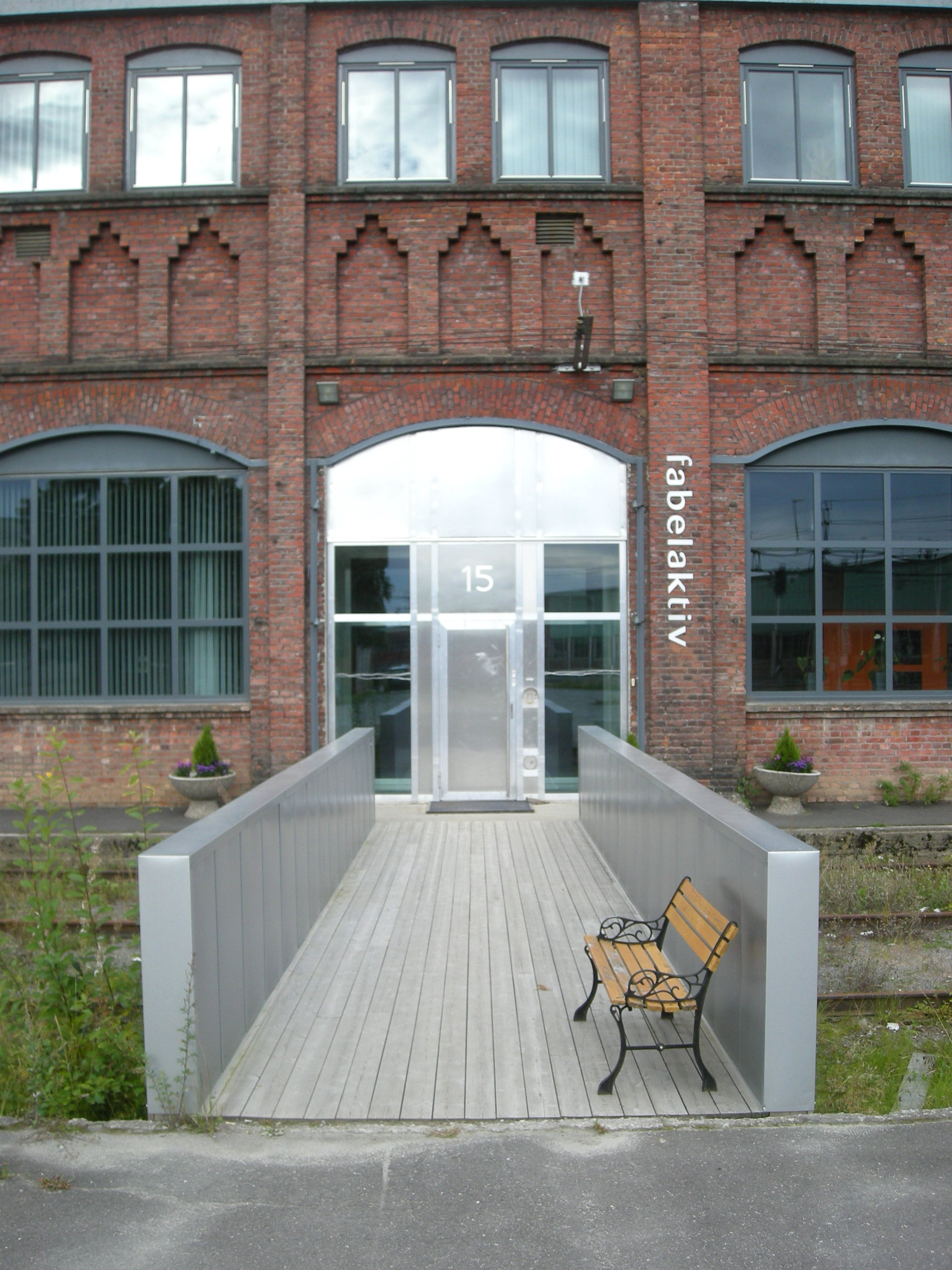 Lokalene til Fabelaktiv ved Hamars gamle jernbaneverksteder